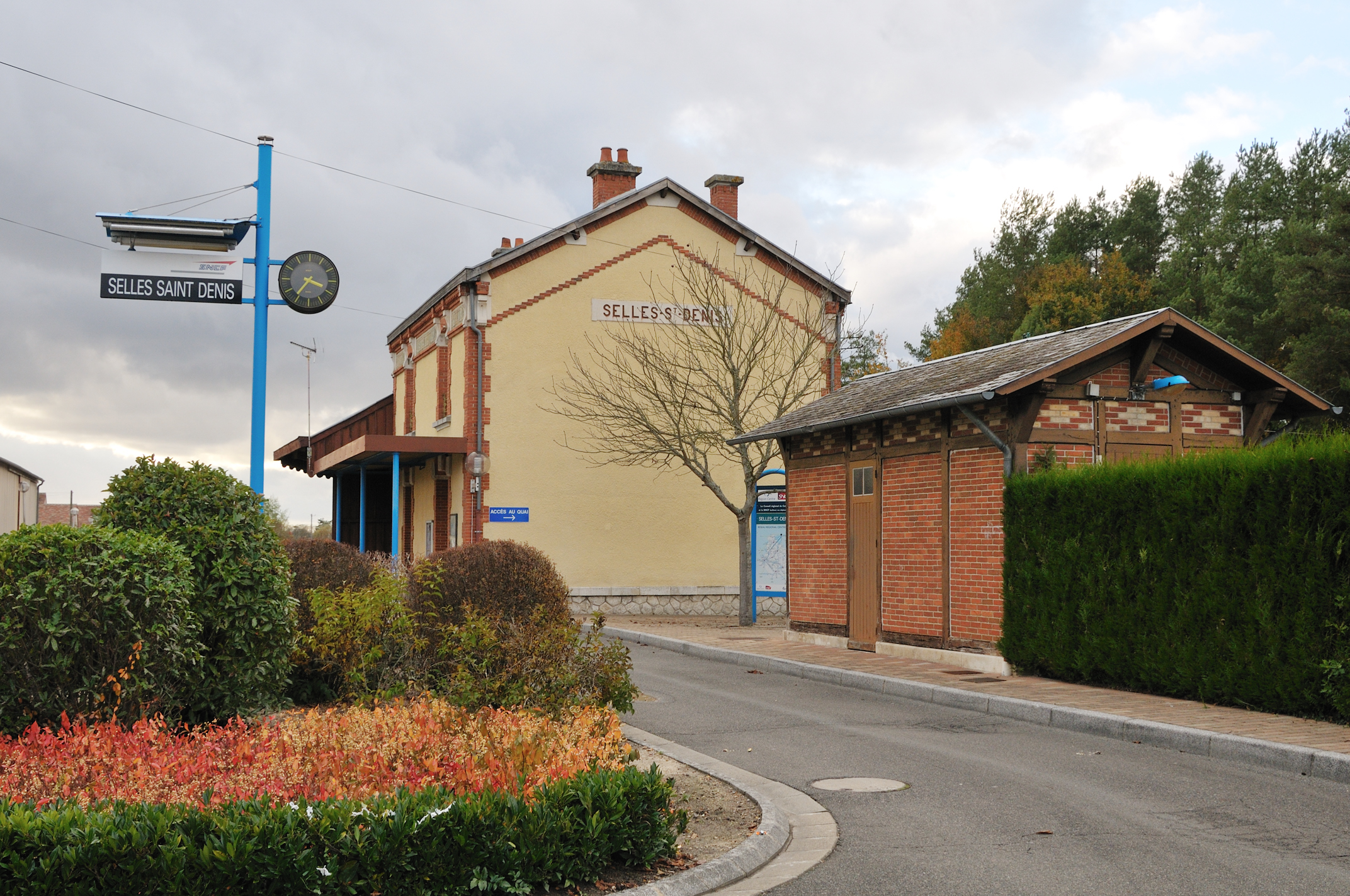 Gare de Selles-Saint-Denis, Loir-et-Cher, France